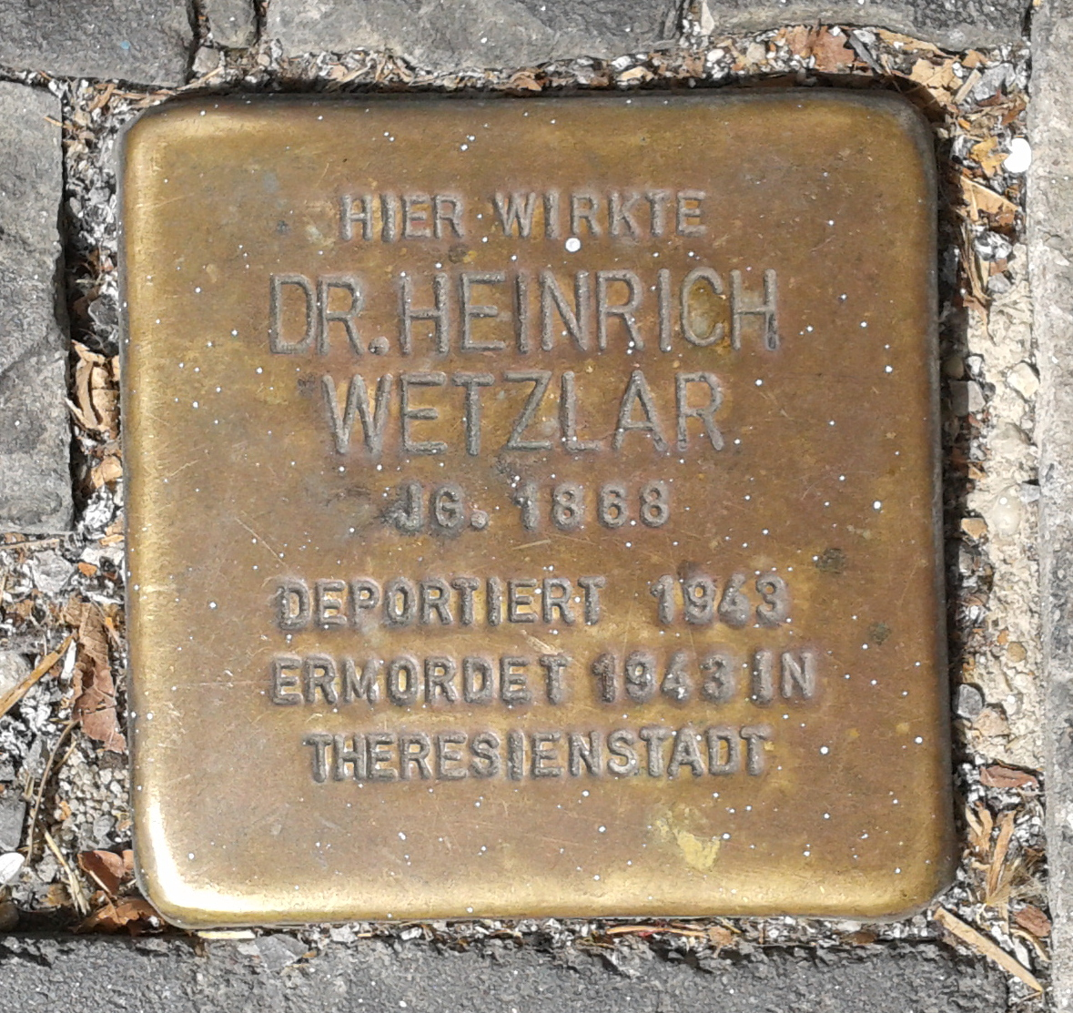 Stolperstein in Mannheim, A1 (gegenüber L1)